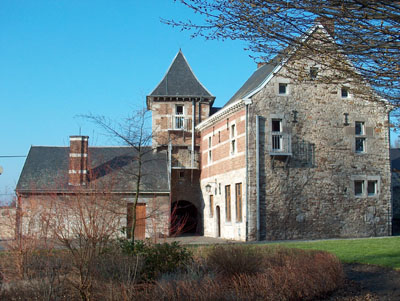 Maison, dite le ponton (Ecole d'Agriculture de l'Etat)